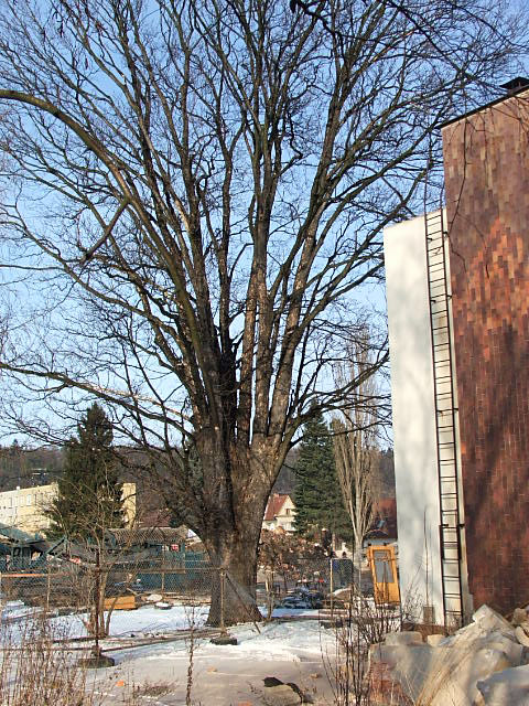 Javor v plynárnách. Snímek je pořízen v době likvidace objektu městské plynárny během níž byla budova v pravé části snímku zbořena.